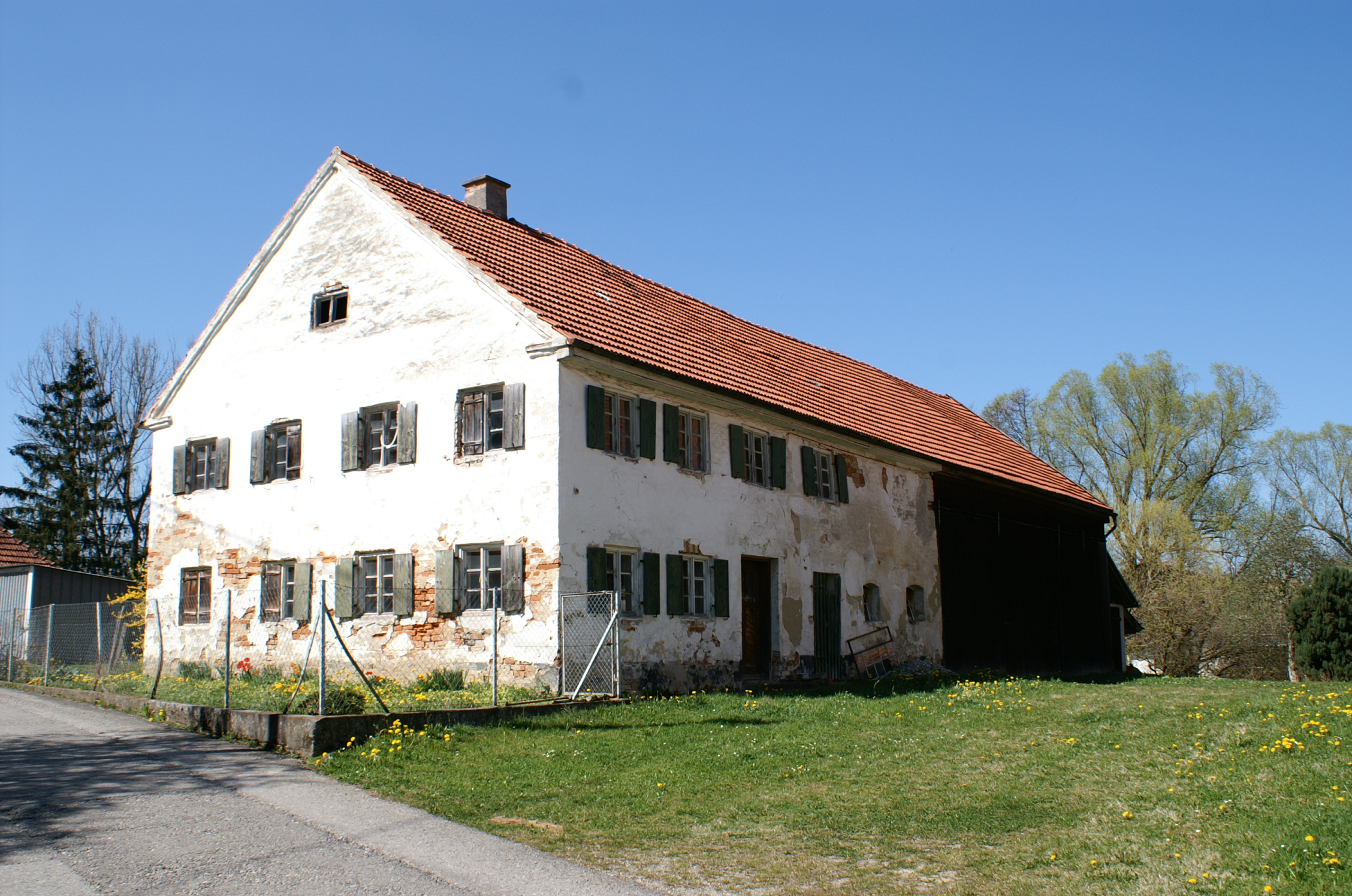 Kirchstr. 4 in Immelstetten, Markt Wald